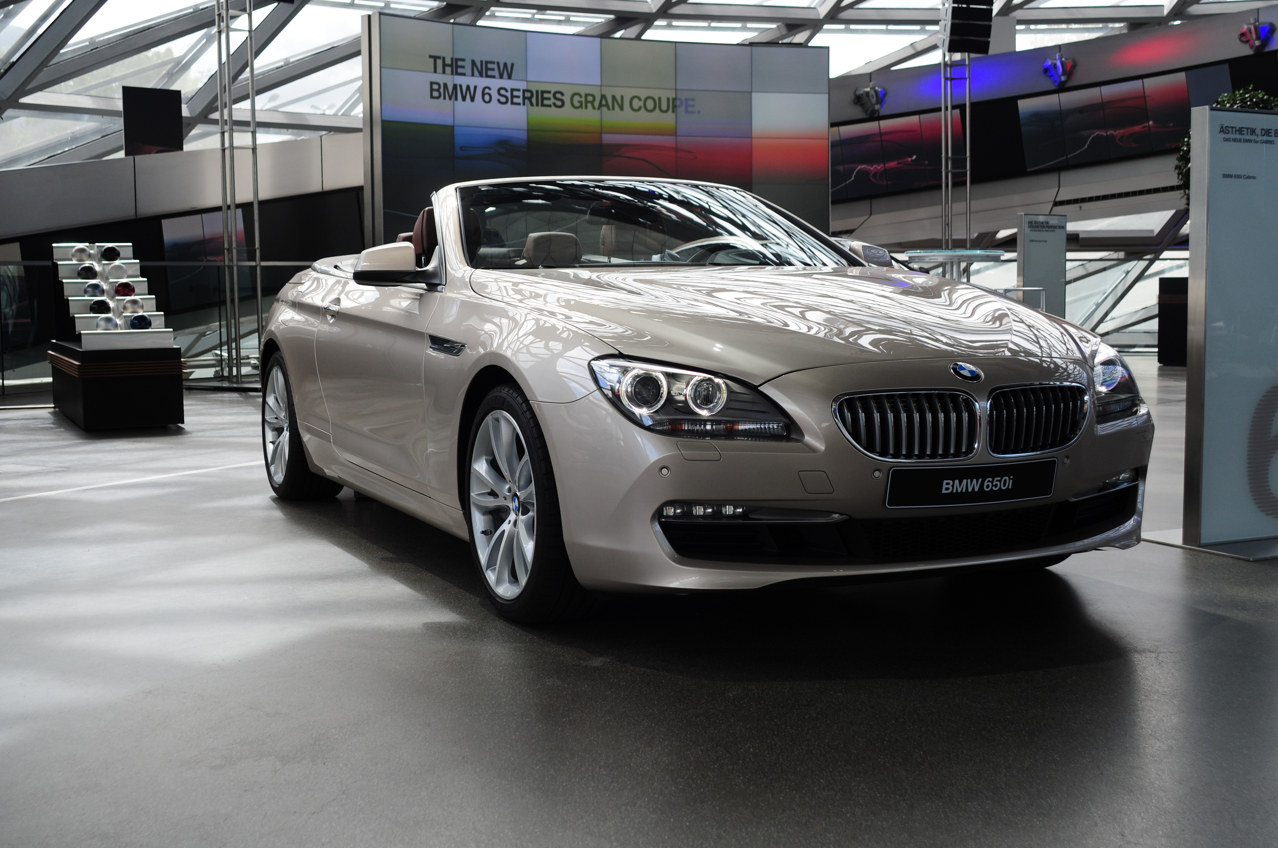 BMW-Welt, München Dieses Bild entstand während des Landtagsprojekts 2012 im Bayerischen Landtag